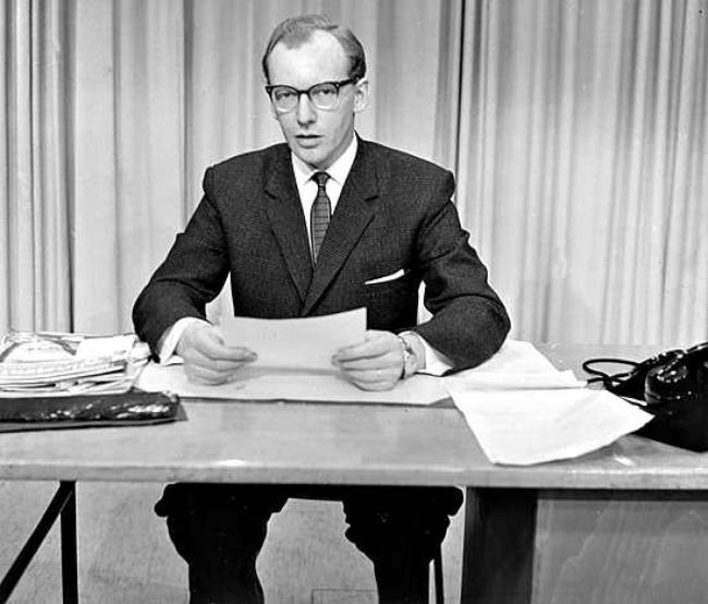 Kauko Saarentaus lukee uutisia tammikuussa 1960.